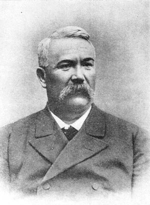 Іван Карпенко-Карий